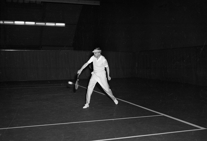 Kungliga Tennishallen. Kung Gustaf VI Adolf spelar tennis